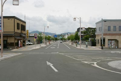 訓子府駅前通り